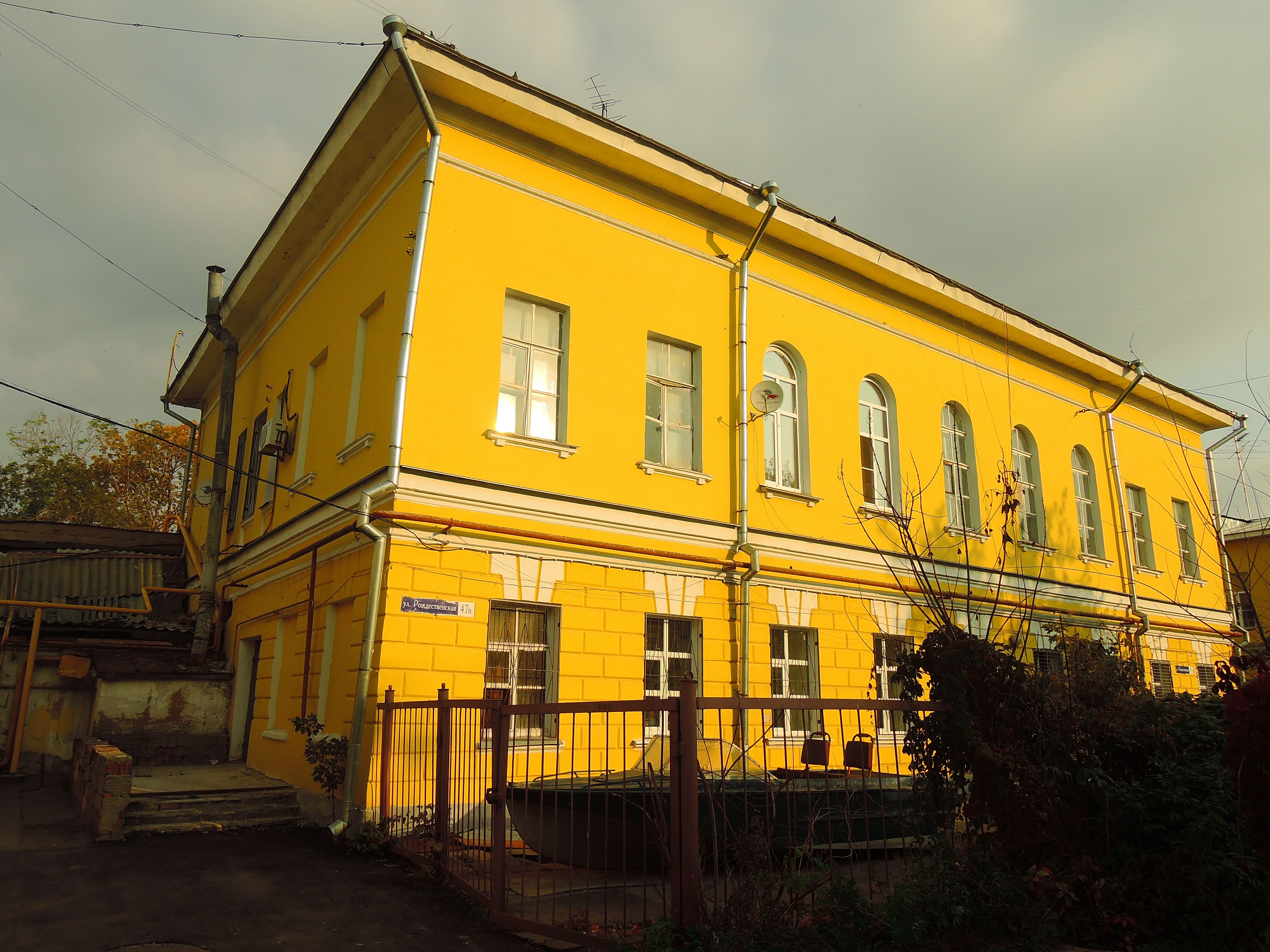 Главный дом: улица Рождественская, 47-в, Нижний Новгород, Нижегородская область